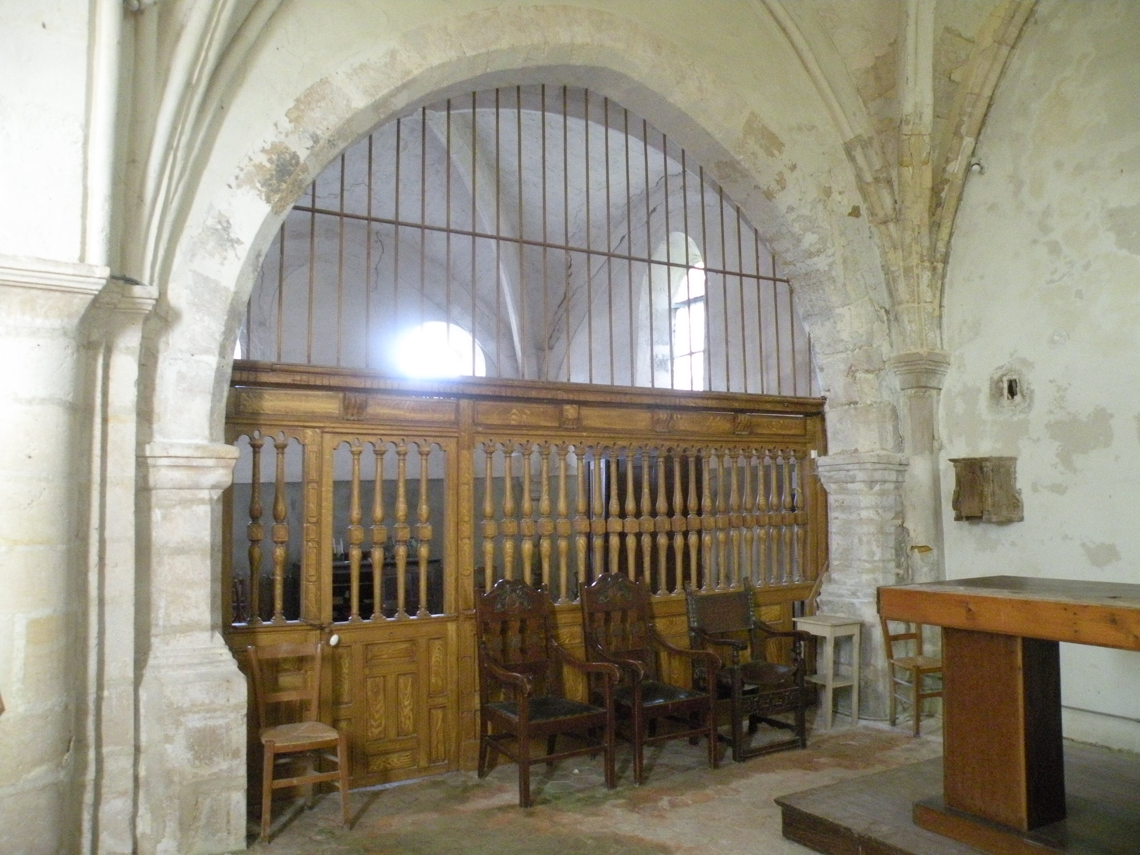 Chœur, élévation nord - grille de clôture de la chapelle.